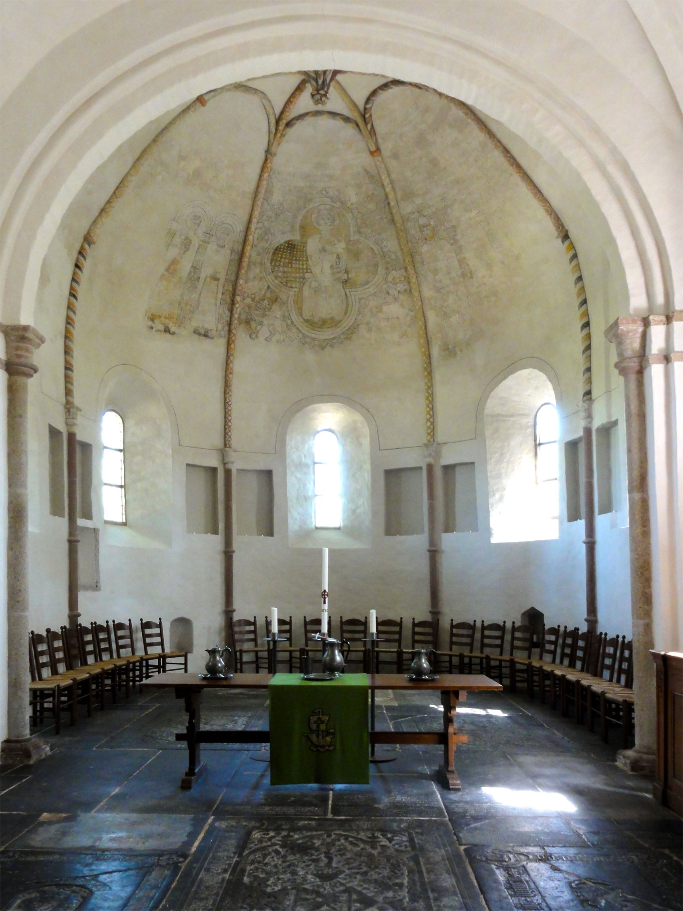 Sint Martinuskerk van Boazum (interieur)